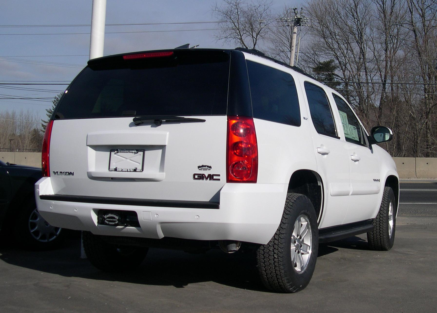 2007 GMT900 GMC Yukon